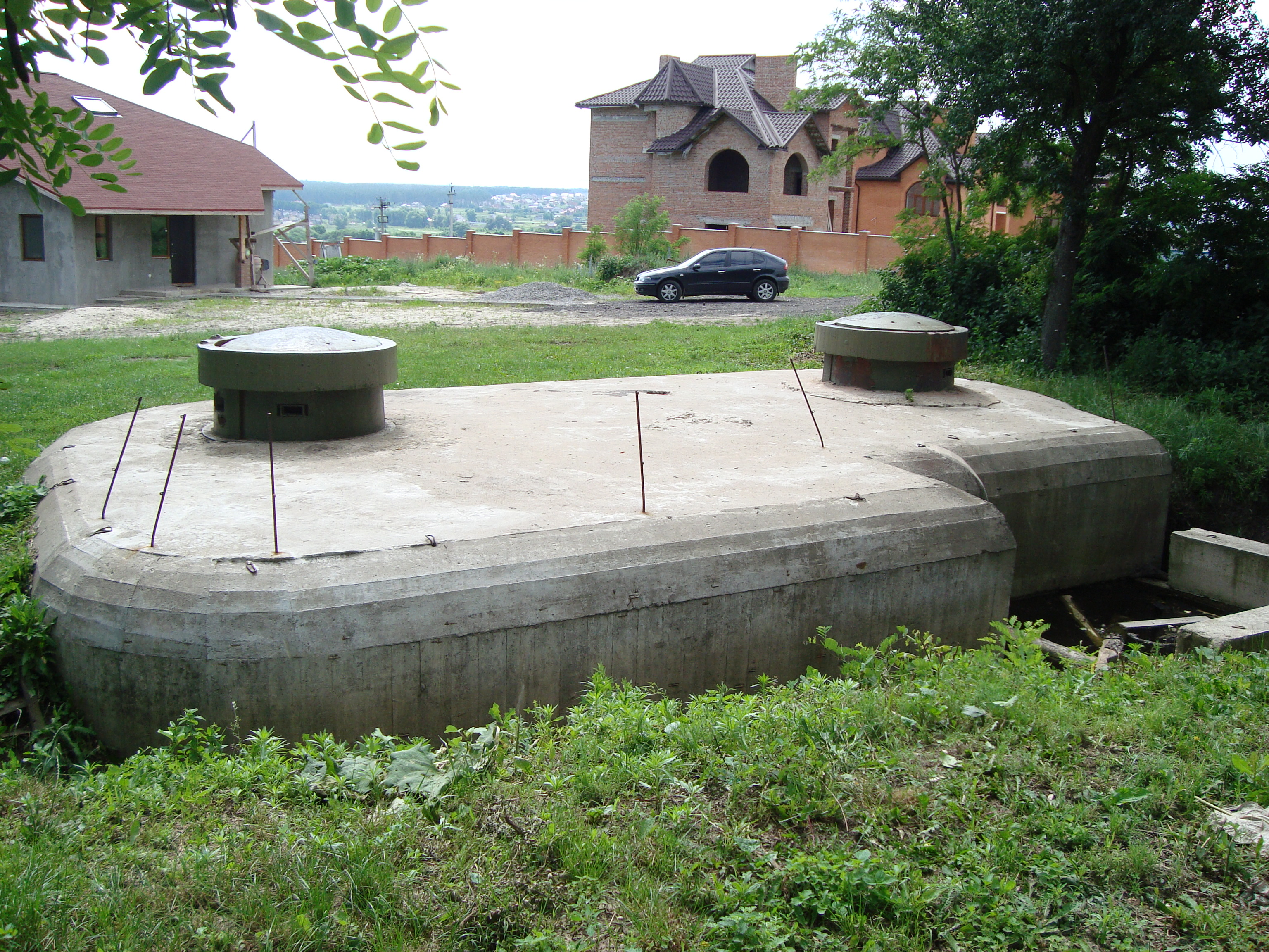 ДОТ 204